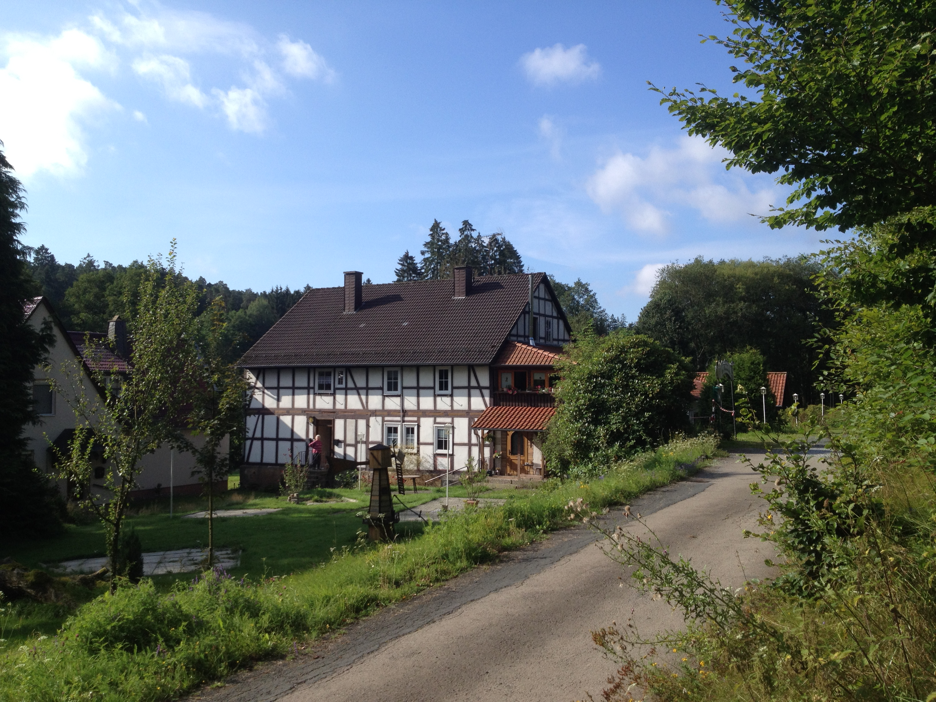 Die Hasenmühle (Gaststätte) am Kassel-Edersee-Radweg südwestlich von Ippinghausen